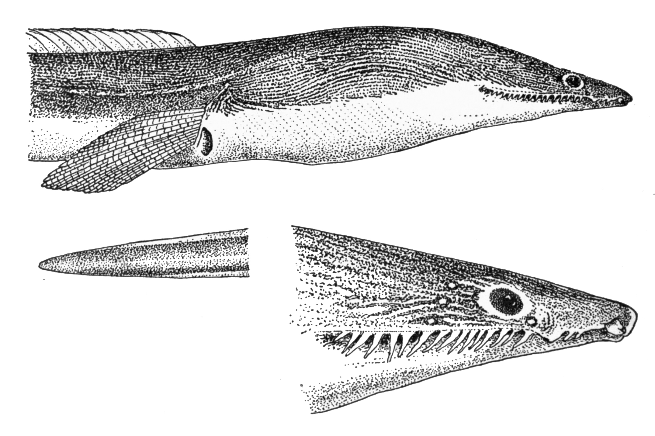 Cirrhimuraena chinensis